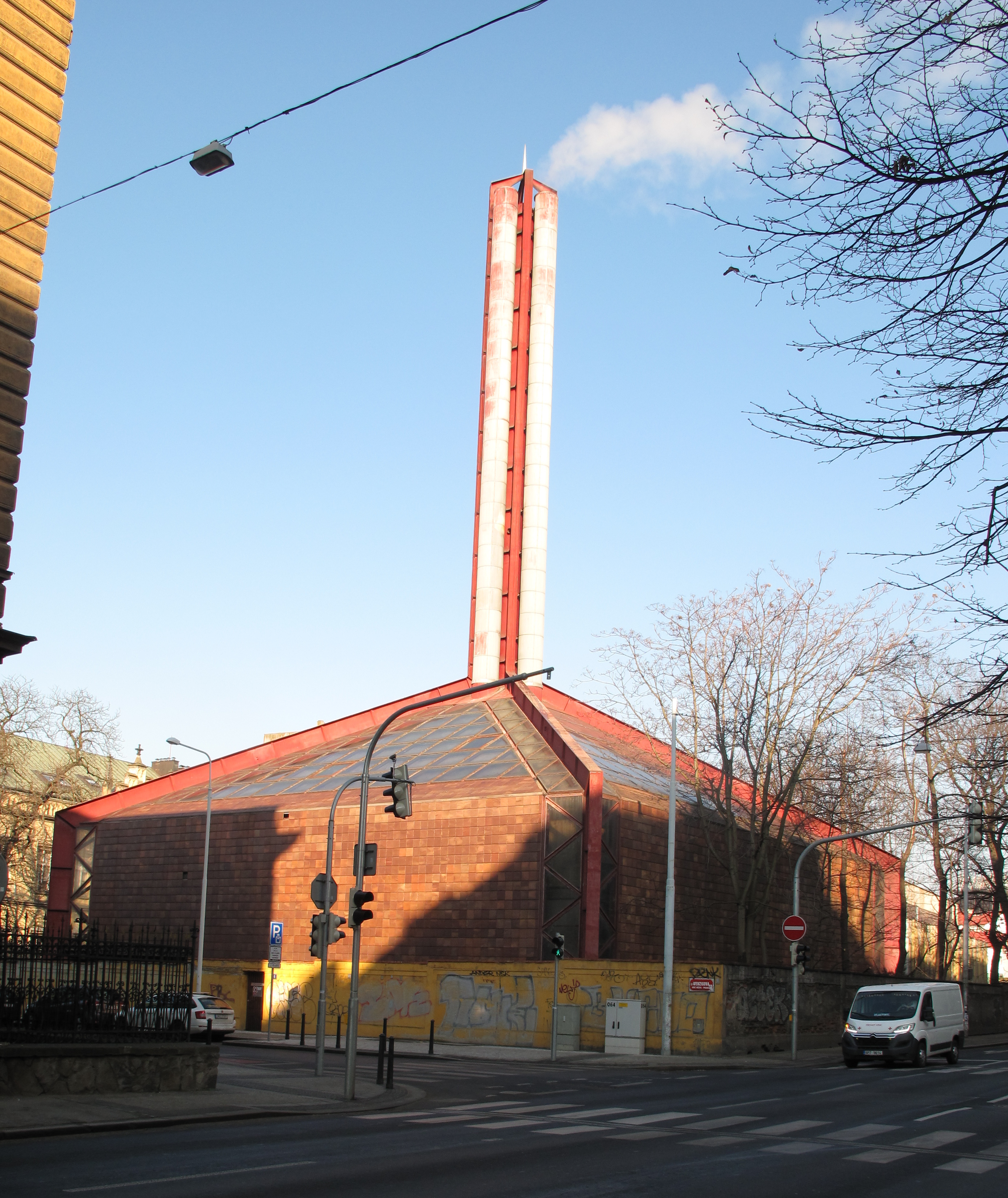 Kotelna Všeobecné fakultní nemocnice v Praze. Praha 2, Česká republika.